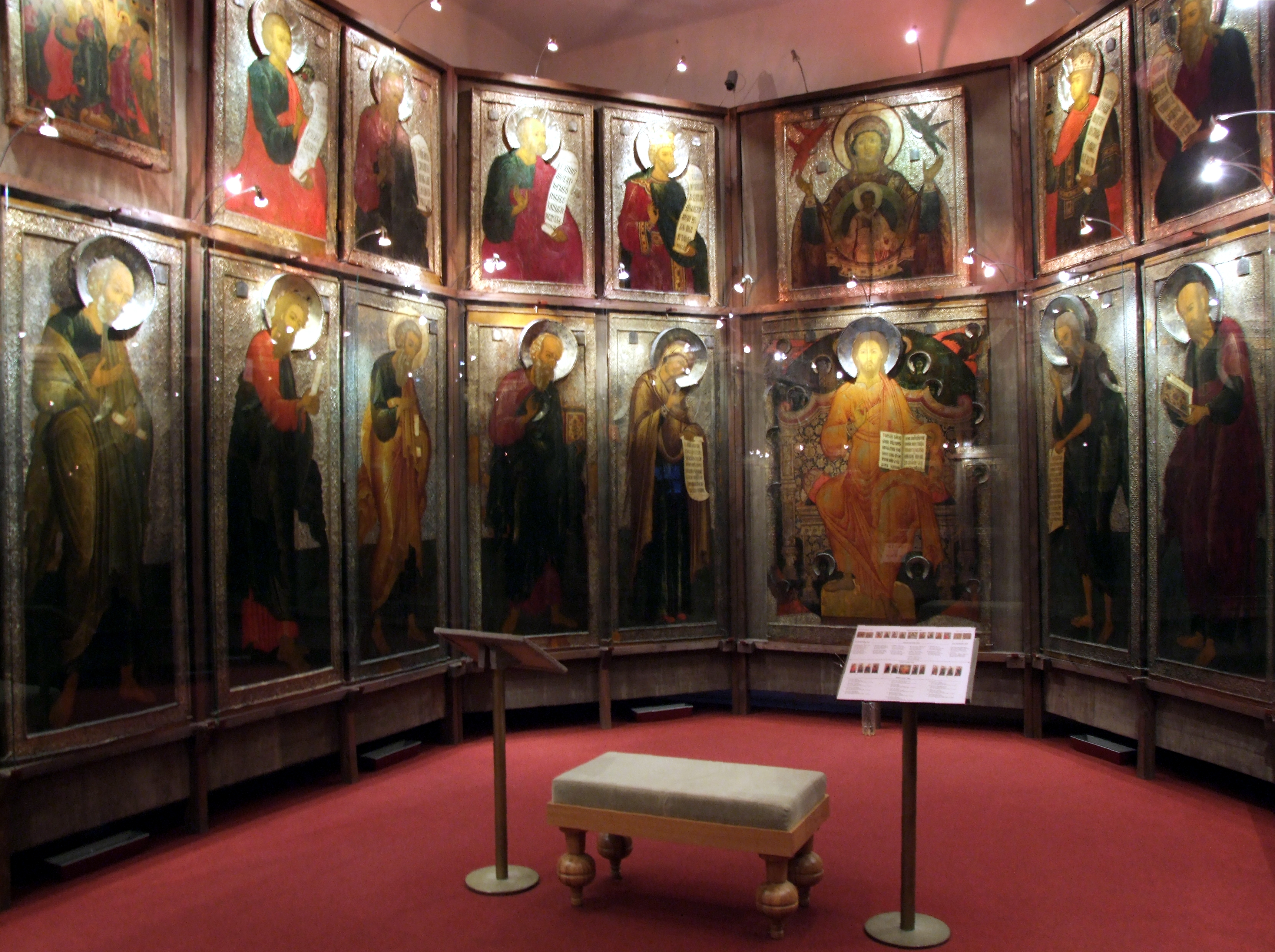 Иконостас Спасо-Евфимиевского монастыря г. Суздаля. Экспозиция музея Рублева, Москва. 1660-е